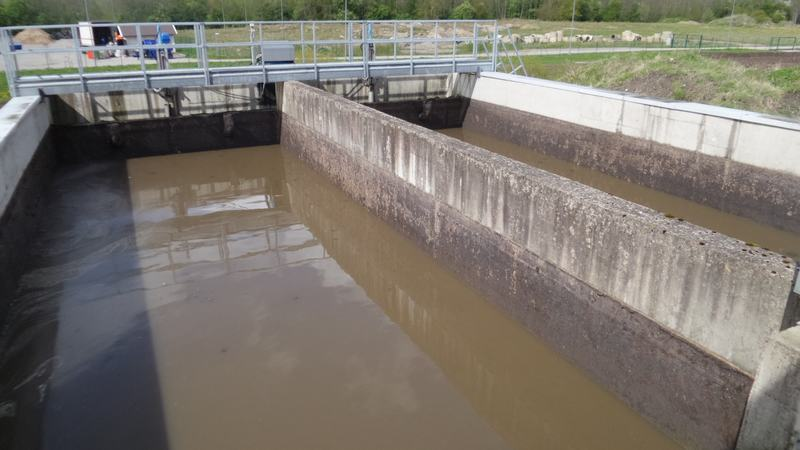 Jõgeva reoveepuhasti eelsetitid